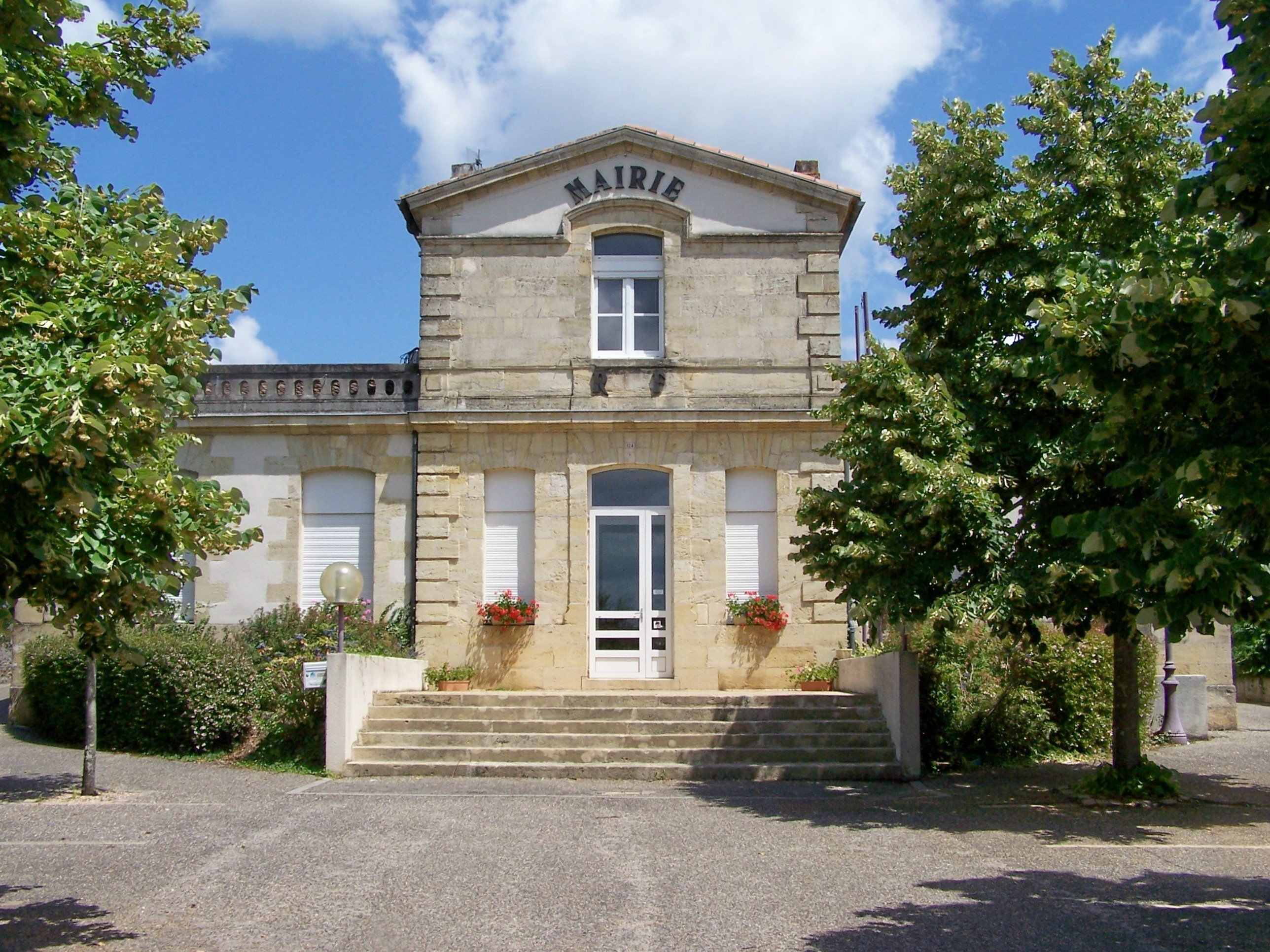 Mairie de Saint-Pierre-d'Aurillac, Gironde, France